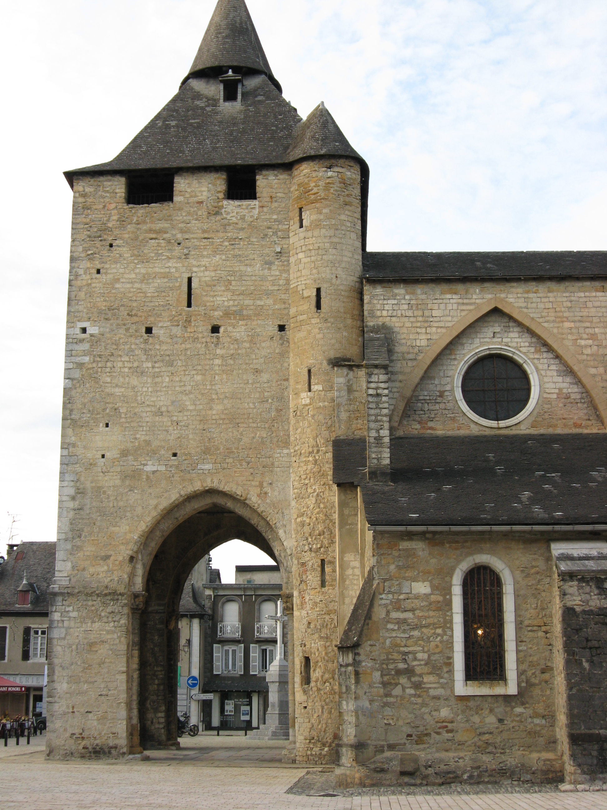 Vue du clocher de la Cathédrale Sainte Marie (Pyrénées Atlantiques) Pyrénées).